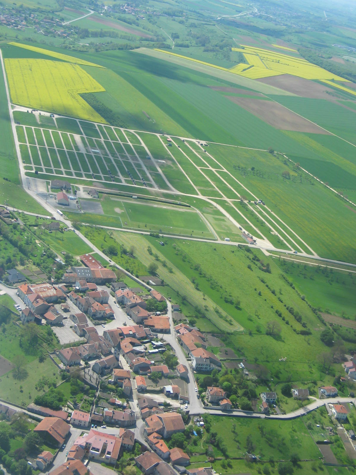 Vue sur le bourg de Poussay avec en arrière plan le champ de foire. ha §Licensing Catégorie:Image de commune des Vosges